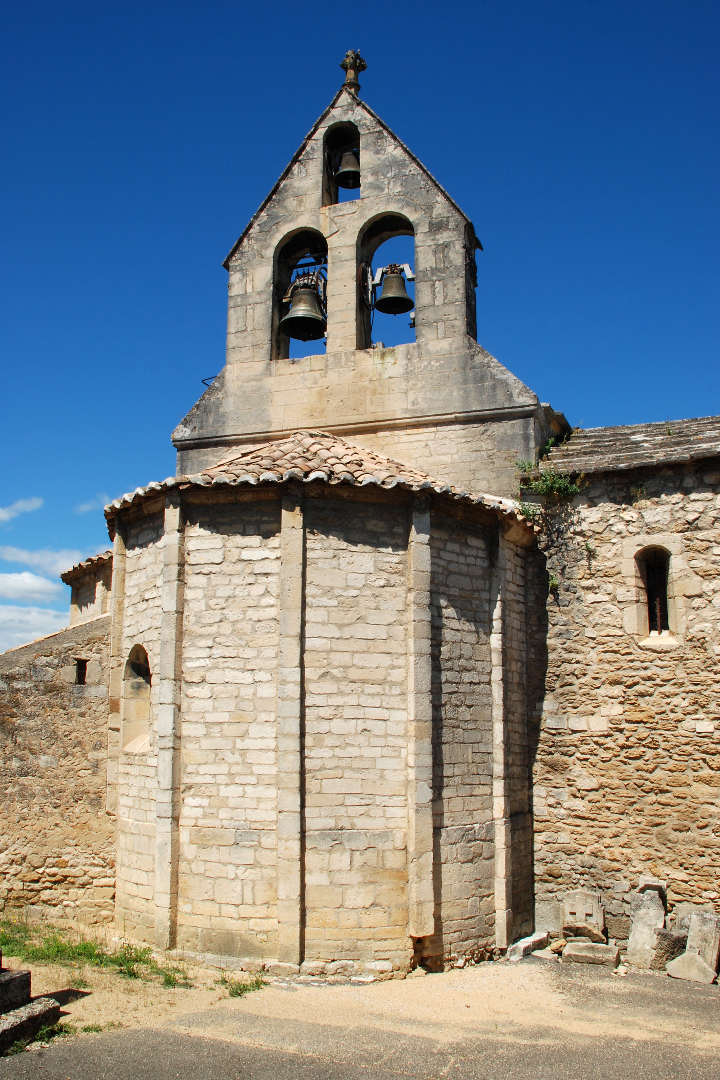 France - Drôme - Église Sainte-Croix de La Baume-de-Transit